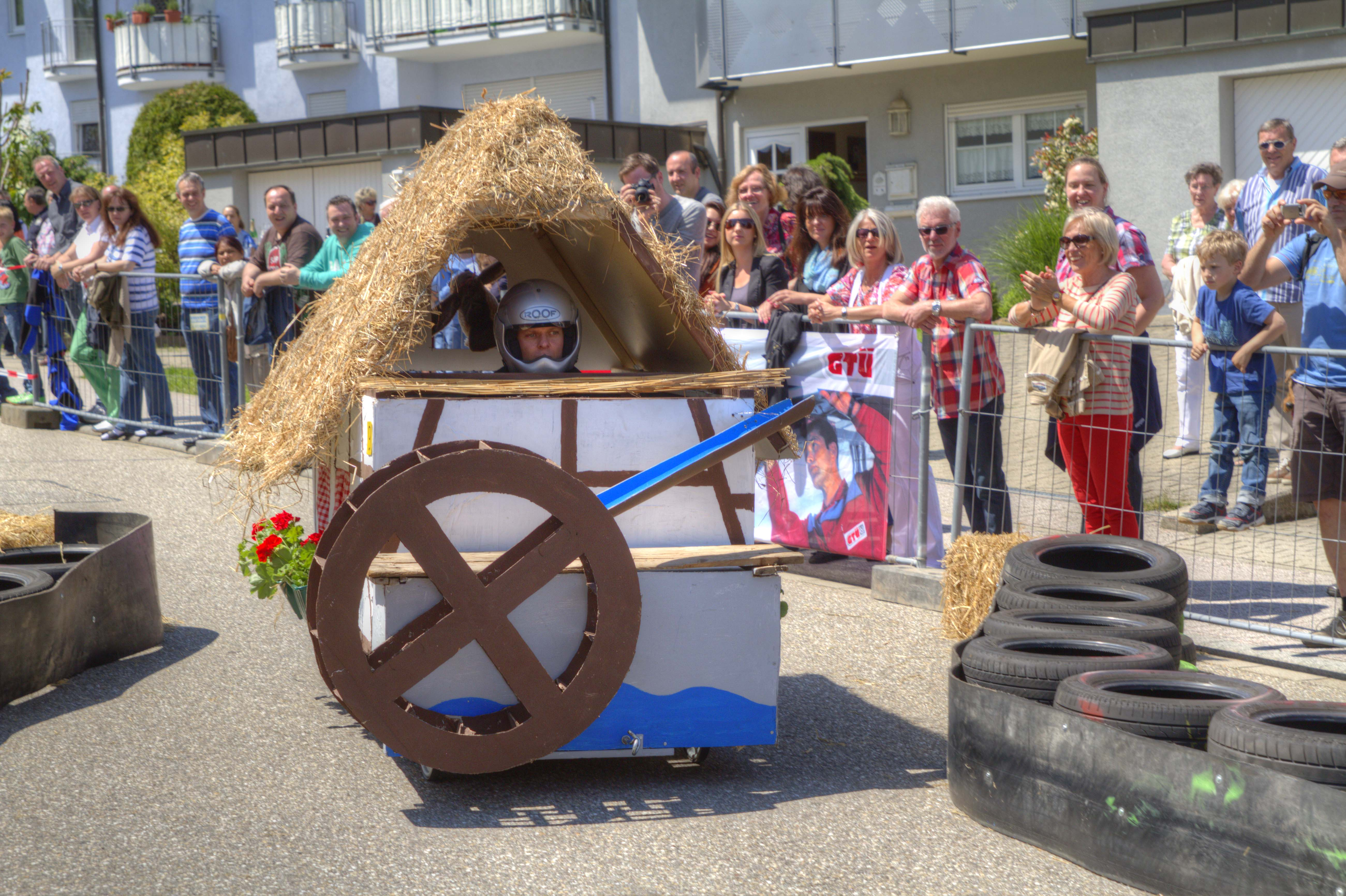 Eine Seifenkiste beim Völkersbacher Brunnenfest. Beim Brunnenfest wird seit einigen Jahre ein Seifenkistenrennen durchgeführt.